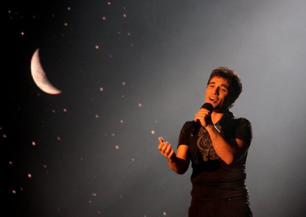 Balada para un Loco - Martín Abascal